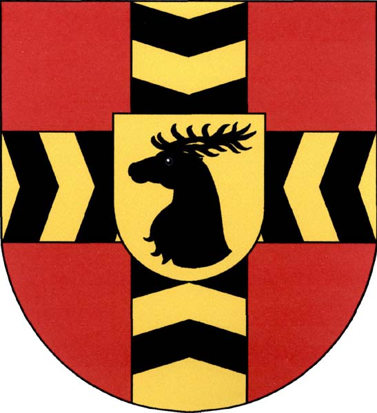 Znak obce Červené Pečky